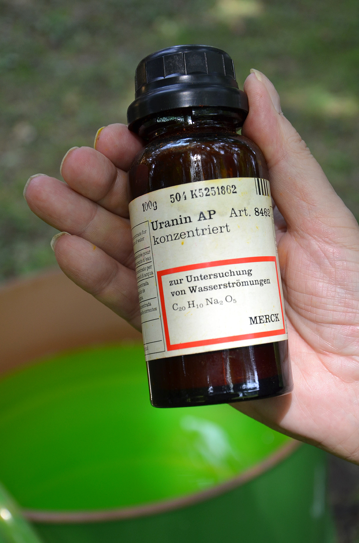 Am Tag der Pressekonferenz für die im August 2013 in Hannover stattfindende Freiluft-Ausstellung WasserKunst: Zwischen Deich und Teich im Park des Edelhofes Ricklingen demonstrierte der Totalkünstler Timm Ulrichs die „ungiftige“ Chemikalie Uranin als einen Werkstoff für sein Kunstwerk Wasserkreislauf- und Leerlaufaktion, 8 Stunden Sisyphusarbeit am Fließband kommunizierender Röhren; in einer 8 Stunden andauernden Aktion hat der Künstler am 1. August 2013 seine „Sisyphos-Arbeit am ‚Fließband‘ kommunizierender Röhren“ verrichtet.